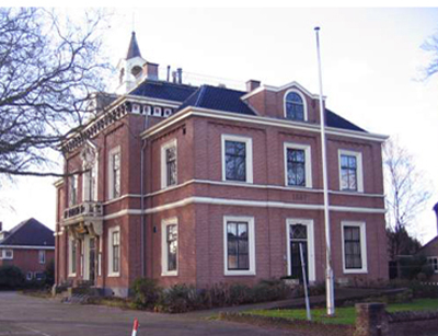 Dit is een foto van het 'Oude Raadhuis' in Hoofddorp. De foto is gemaakt rond 1990, na de renovatie. Voorheen was dit het Stadhuis, inmiddels is het stadhuis verplaatst, het Raadhuis doet nu dienst als Theater. De foto is zelfgemaakt.